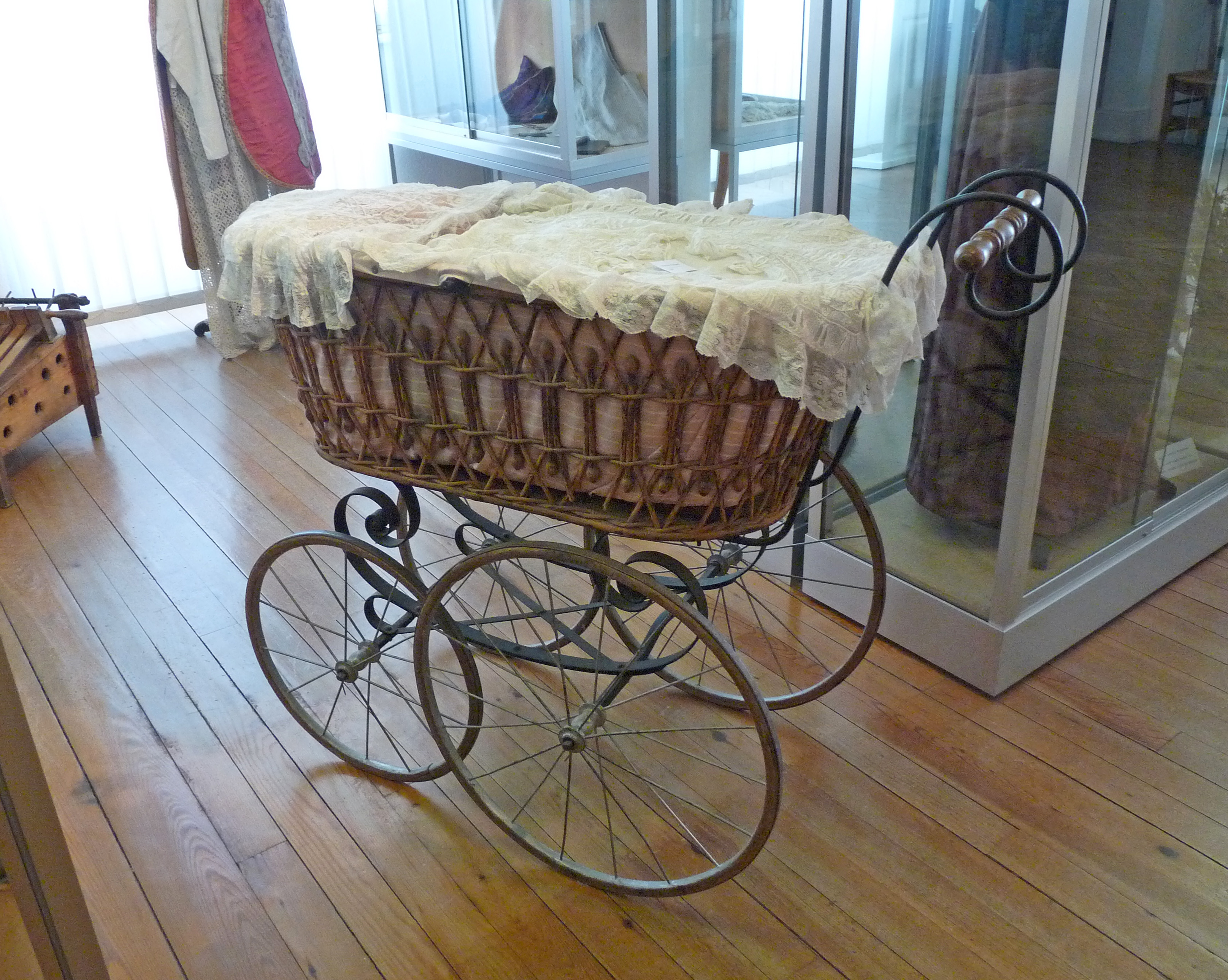 Landau au Musée sundgauvien